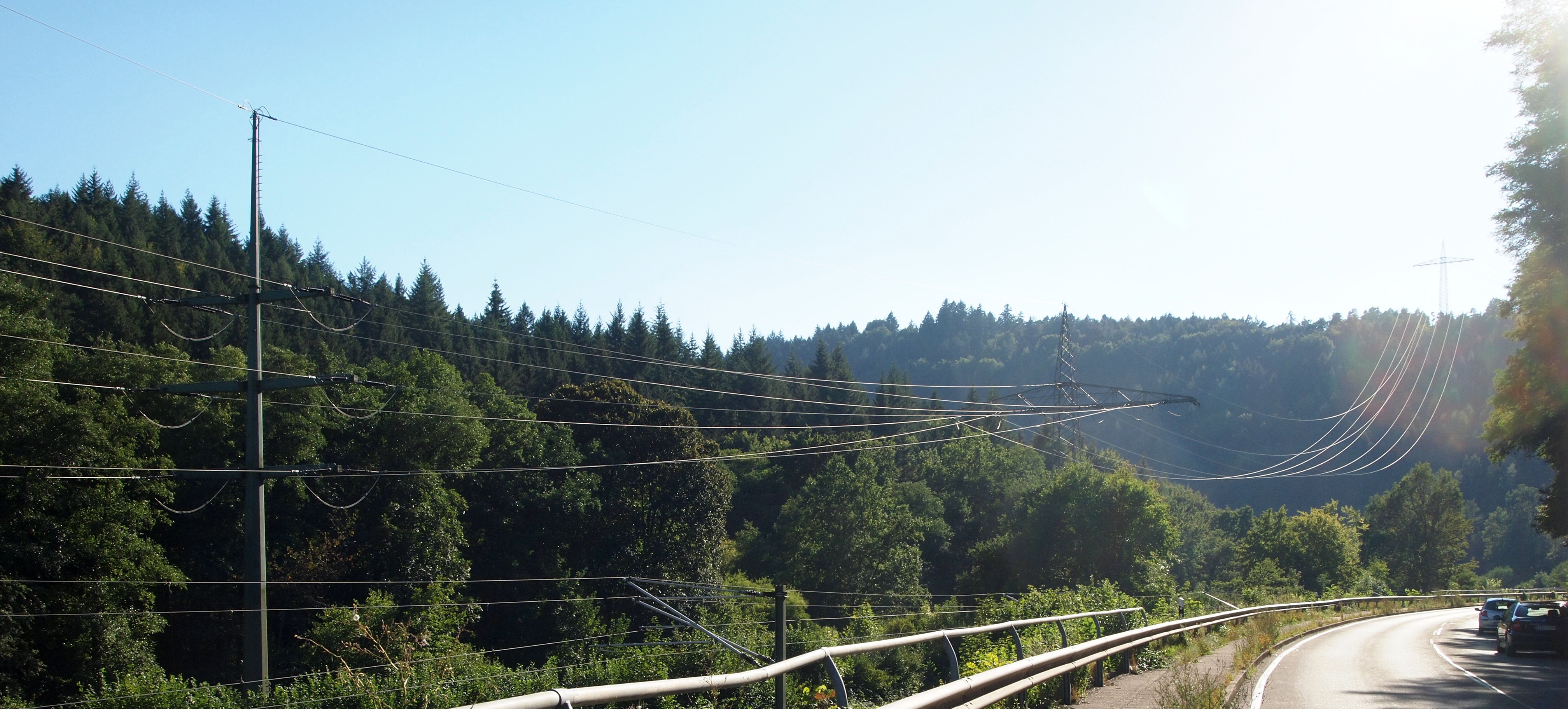 Stahlrohr-Tonnenmast und Einebenen-Gittermast der 110-kV-Freileitung Birkenfeld—Schwann (Anlage 606) im Enztal